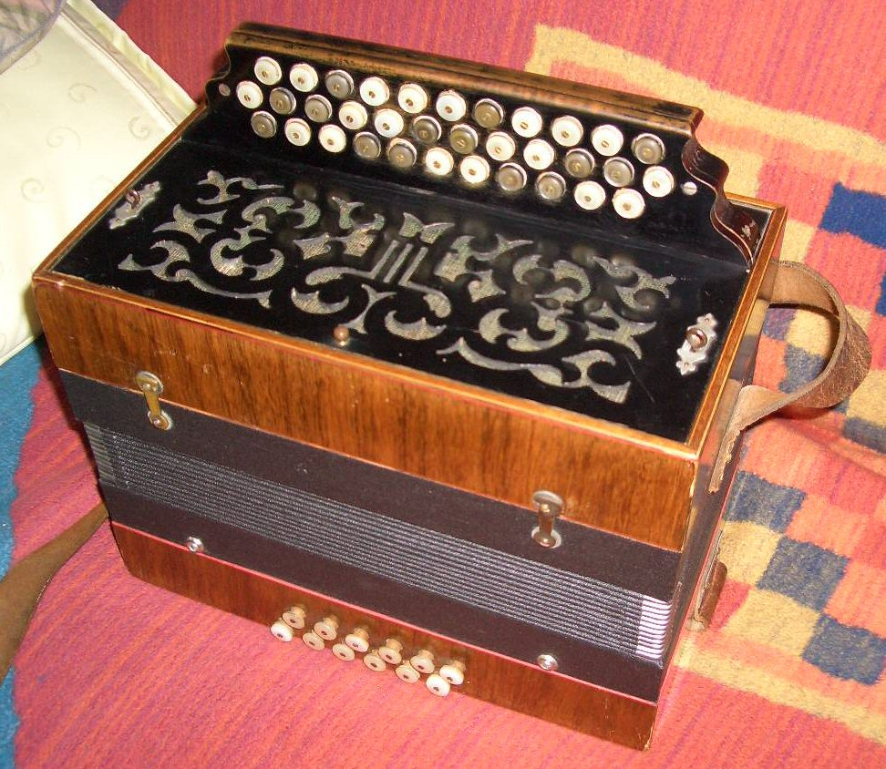 Wiener Modell gebaut von Fa. Hochholzer andere Versionen: keine Möglichkeiten zur Lizenzierung, bitte die nicht-benötigte Variante aus dem Code löschen